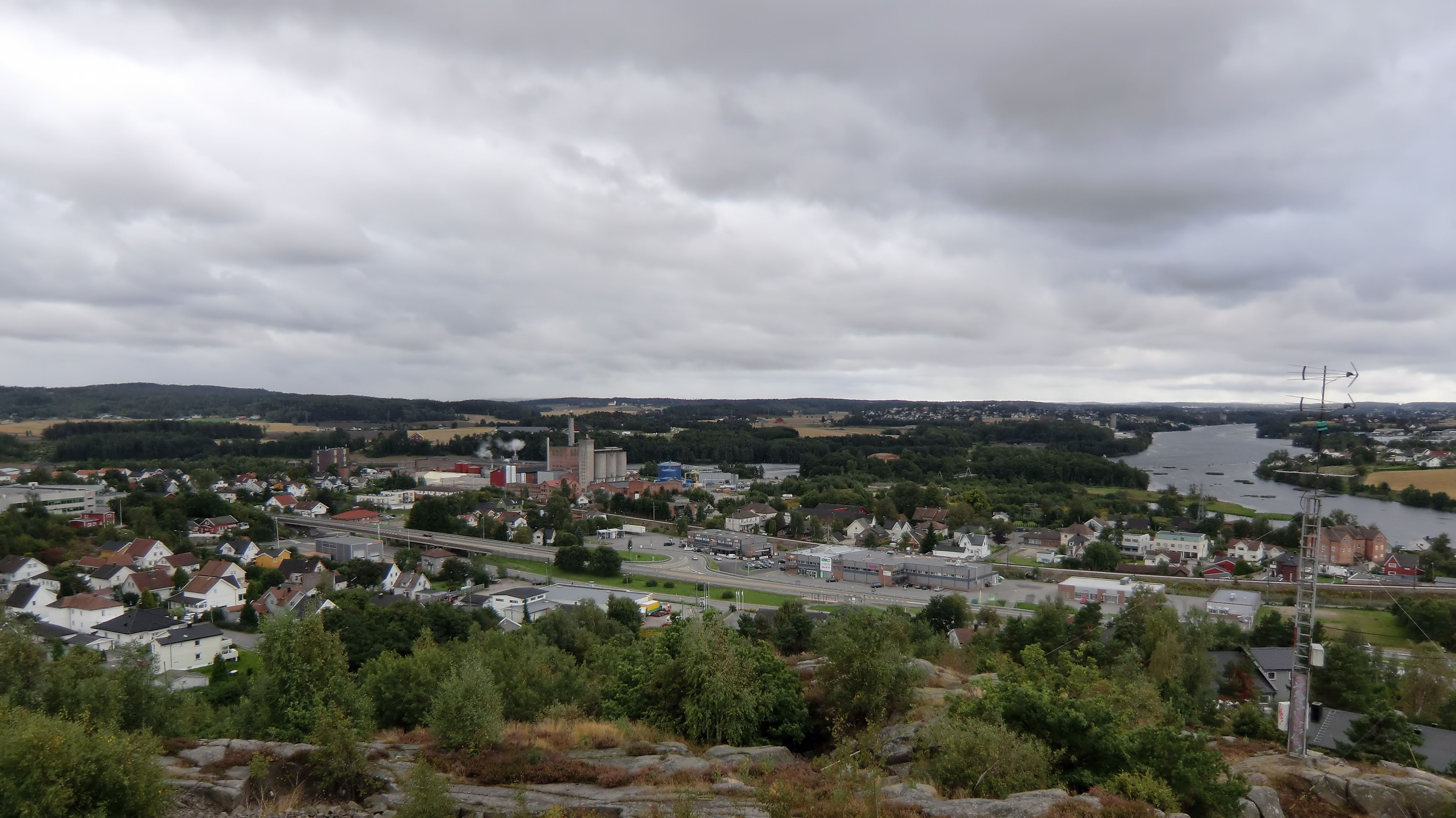 Greåker sentrum sett fra Greåker fort.